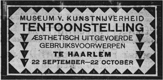 Anoniem. Advertentie tentoonstelling Haarlem. Afkomstig uit Haarlems Dagblad (20 spetember 1919).